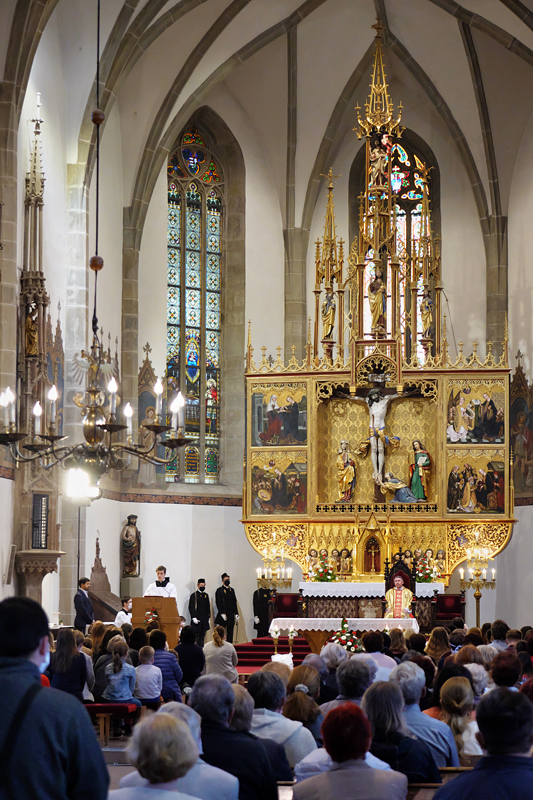 Kežmarok - Bazilika svätého Kríža (interiér)